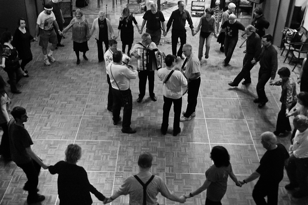 A Bulgarian wedding band